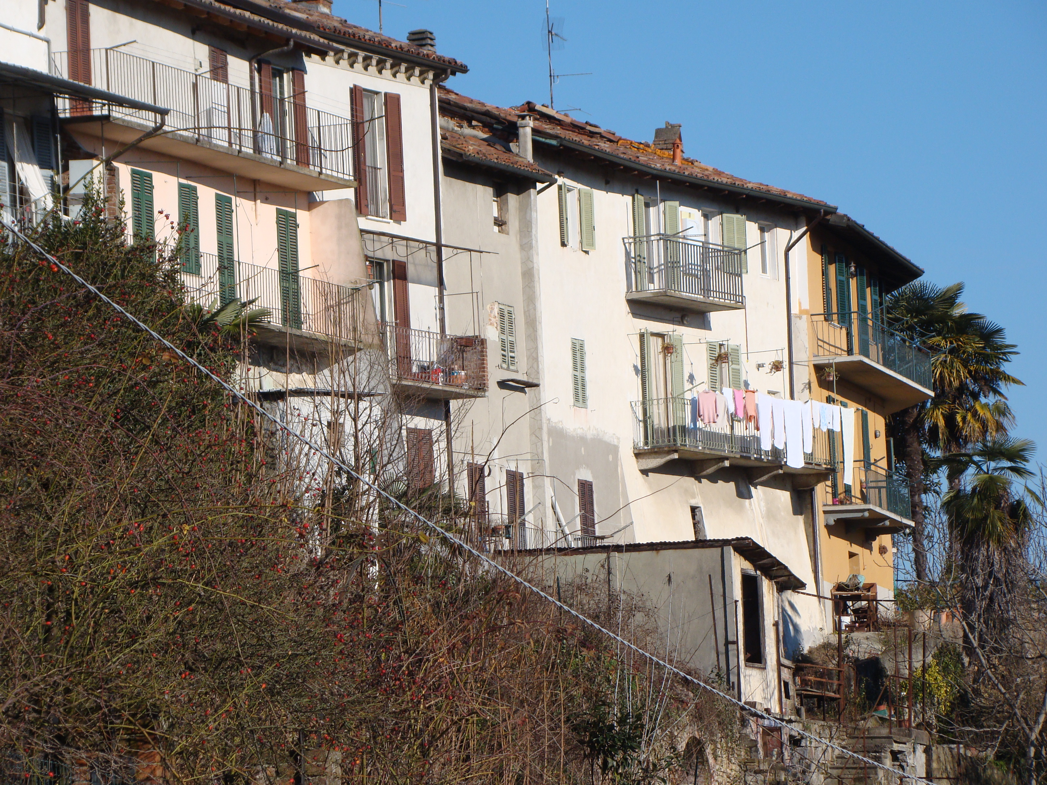 Via IV Novembre lungo il tracciato delle antiche mura